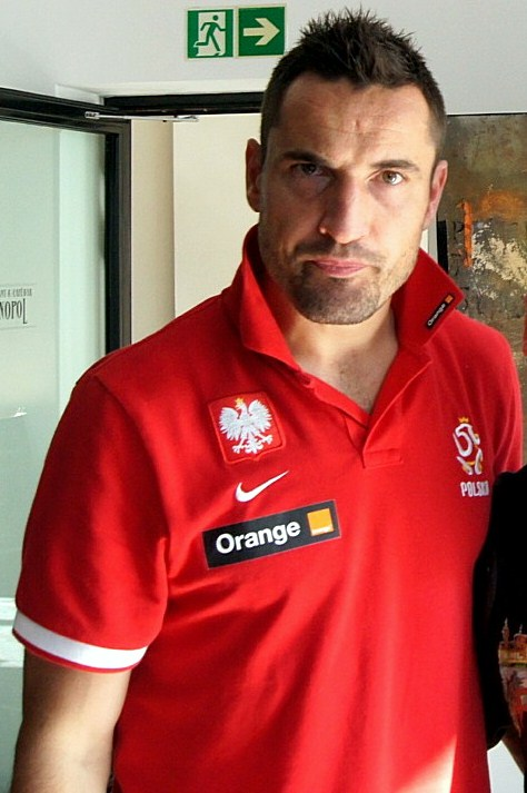 Marcin Wasilewski.